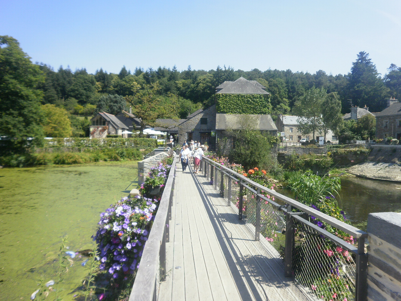 La passerelle suspendue sur l'Aff à La Gacilly